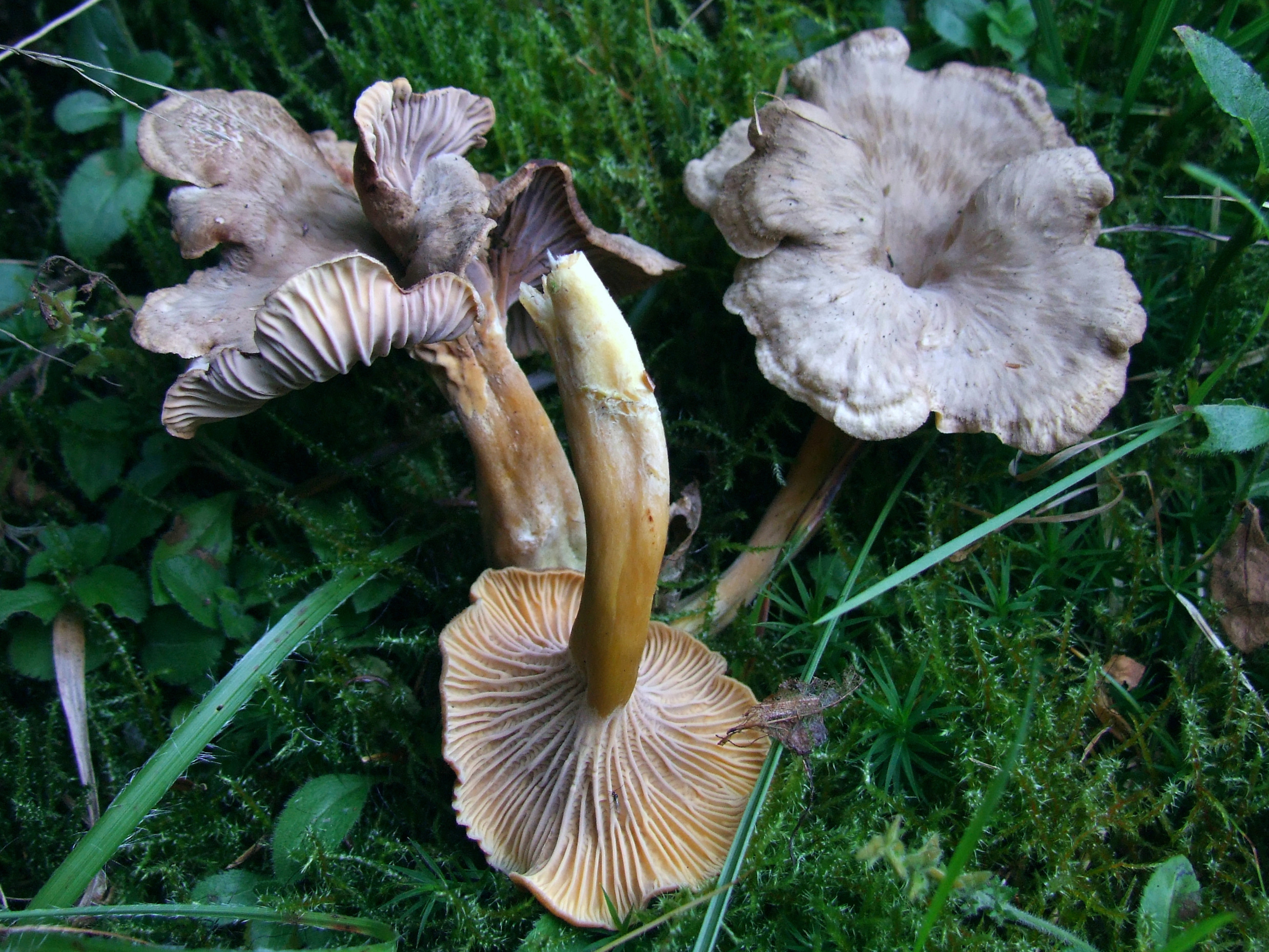 Cantharellus tubaeformis (habitat:Magura Spiska)